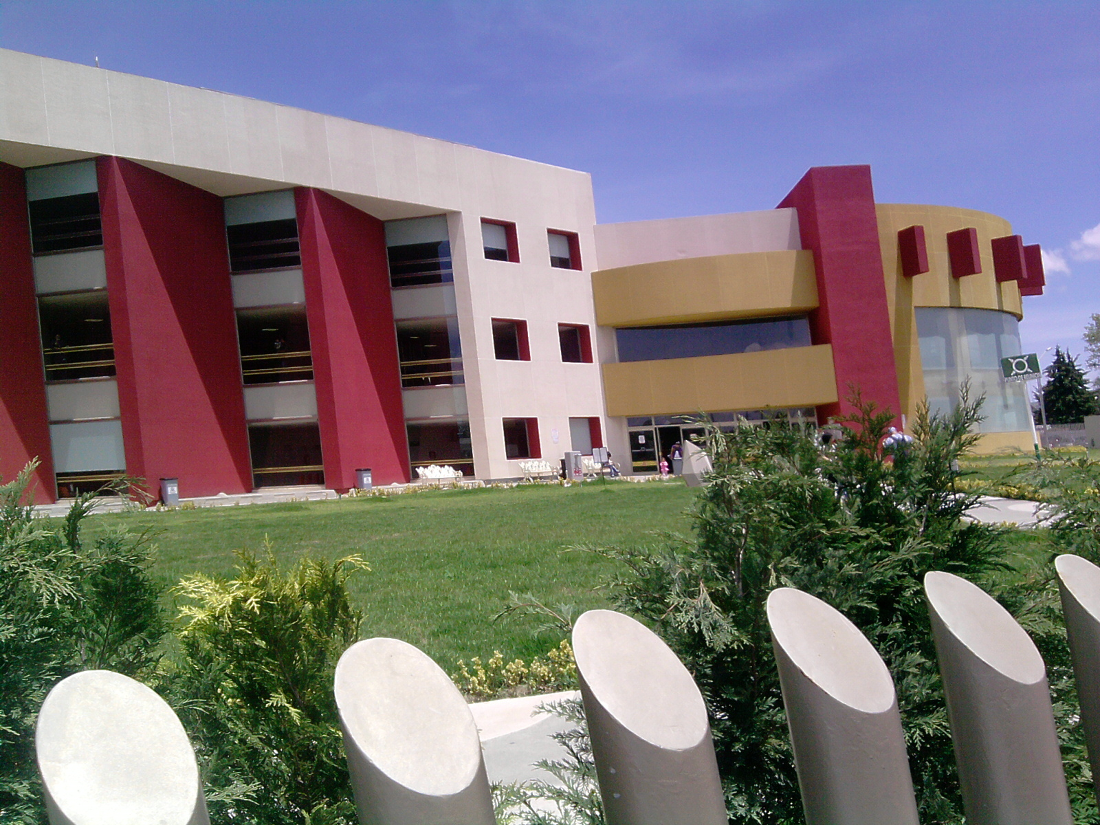 Fachada Principal del Hospital del Niño DIF “María Elena Sañudo”. En Pachuca, estado de Hidalgo, México.